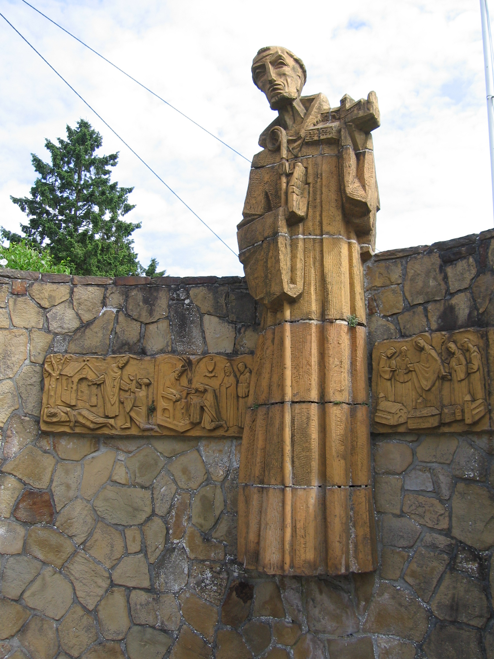 Statue moderne de Saint Gérard de Brogne, fondateur de l'abbaye de Saint-Gérard (se trouvant sur la place de Saint-Gérard, Belgique)